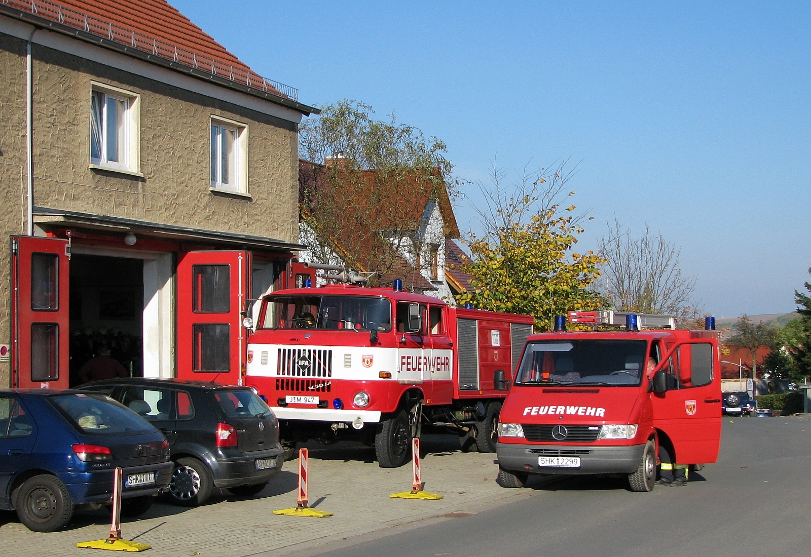 Dornburg an der Saale Freiwillige Feuerwehr Foto 2008 Wolfgang Pehlemann Wiesbaden IMG_0213